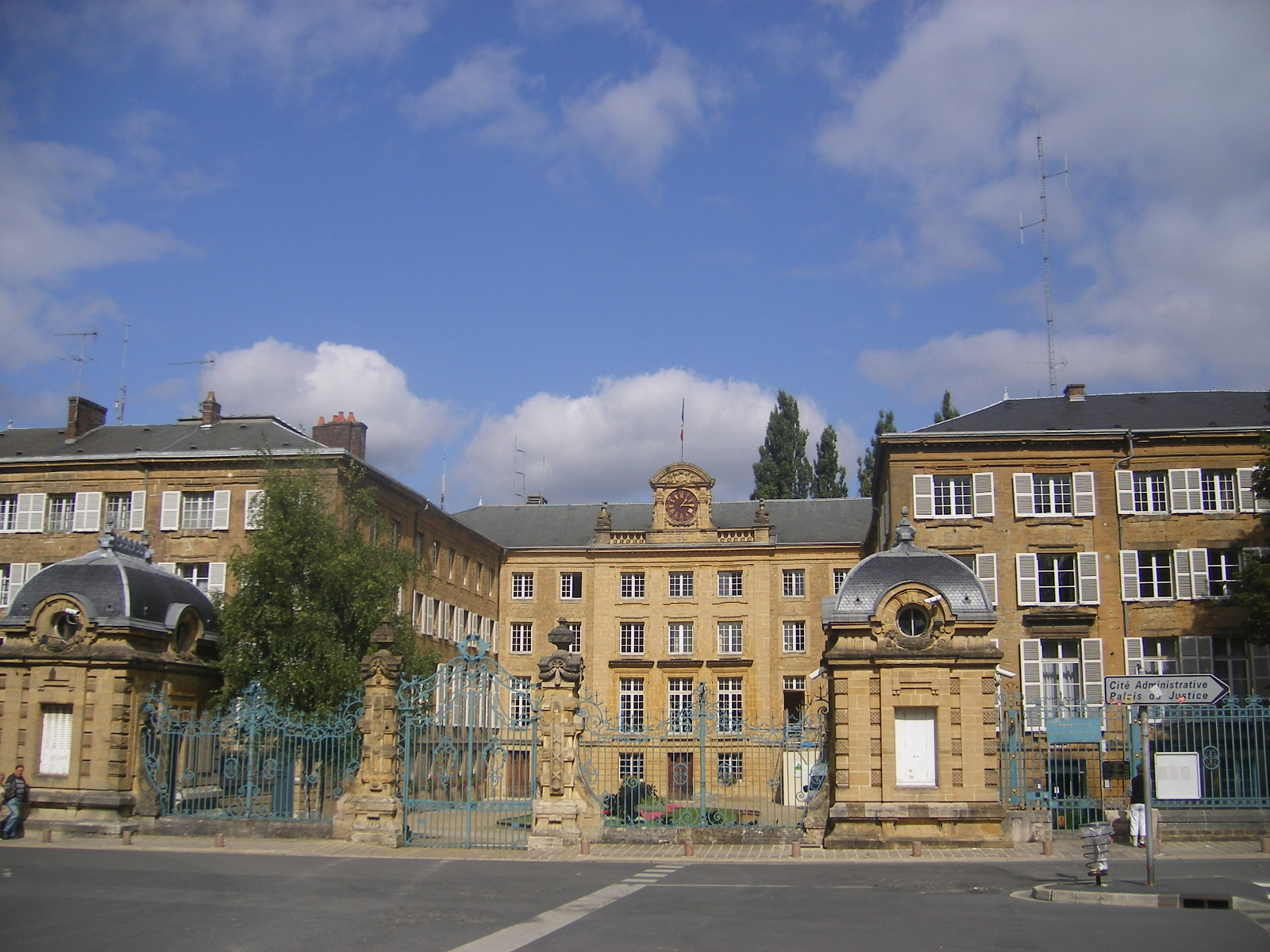 Charleville-Mézières - Prefecture of Ardennes